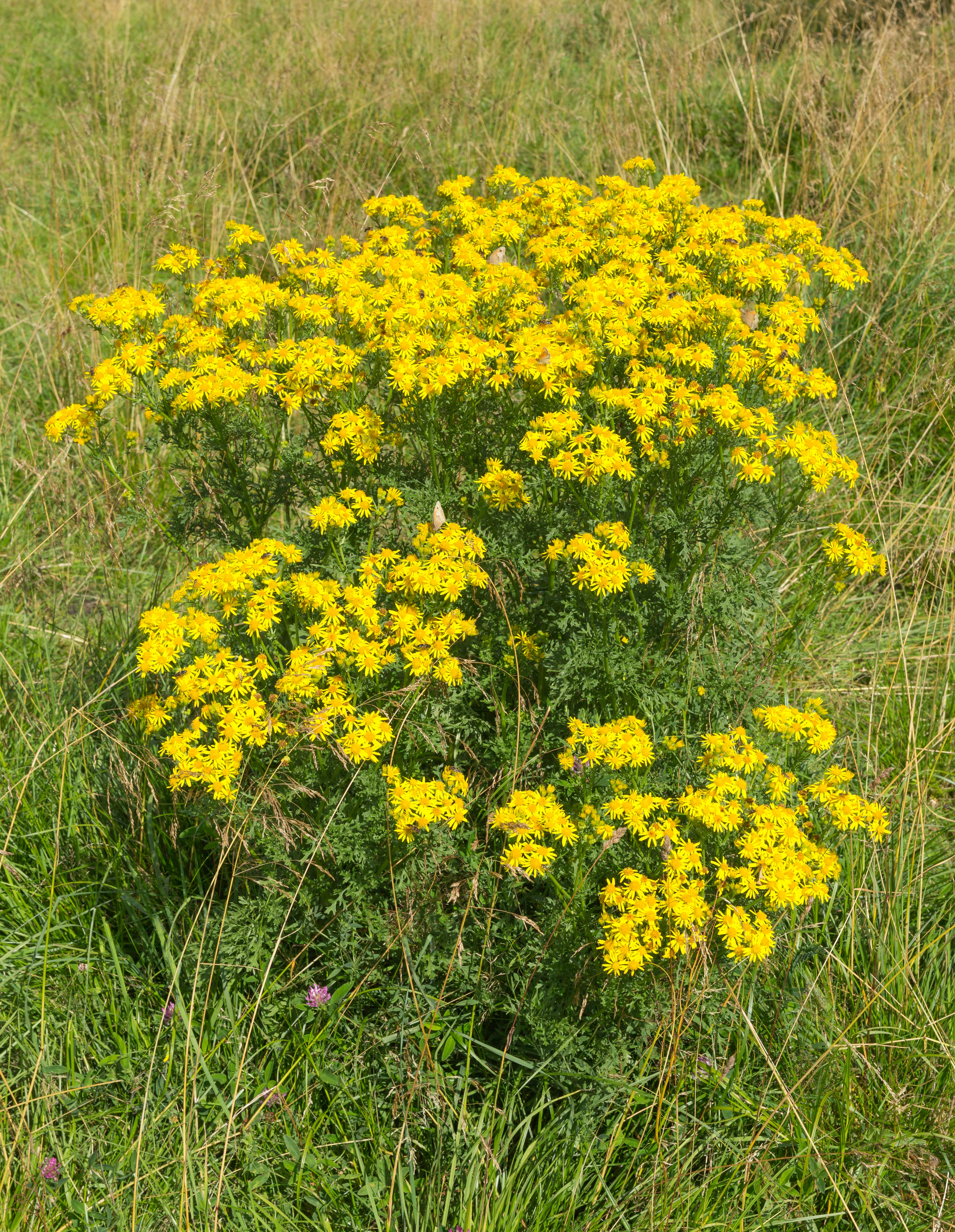 Eng-brandbæger i Kasted Mose